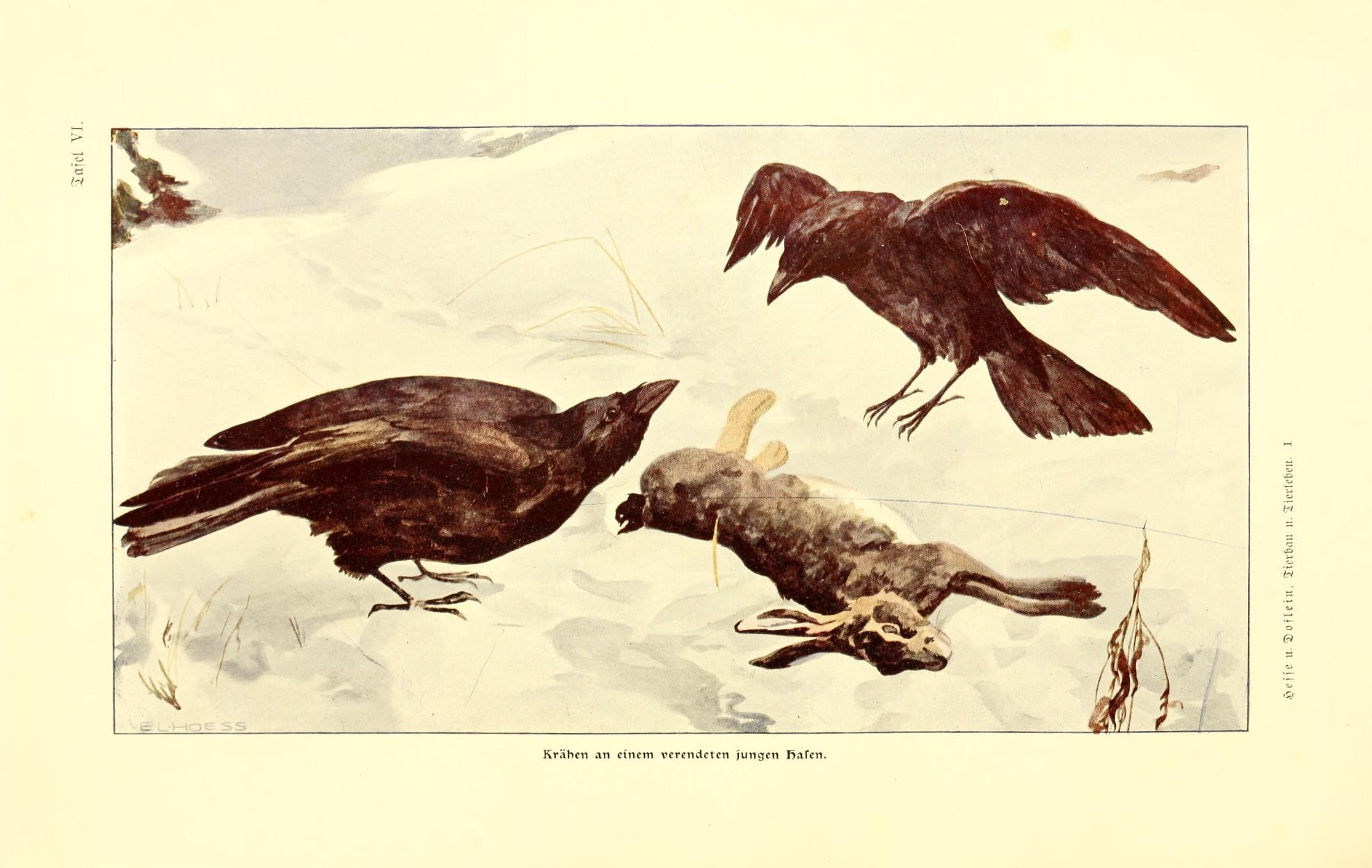 5:arci VI. ■•Öefie 11. Sotleiii, Jii-vBiiii ii. 2ier(c6eii. I